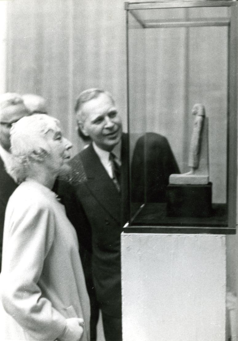 Pierre Gilbert présente à la reine Elisabeth l’exposition « 5000 ans d’art égyptien » au Palais des Beaux-arts de Bruxelles en 1960